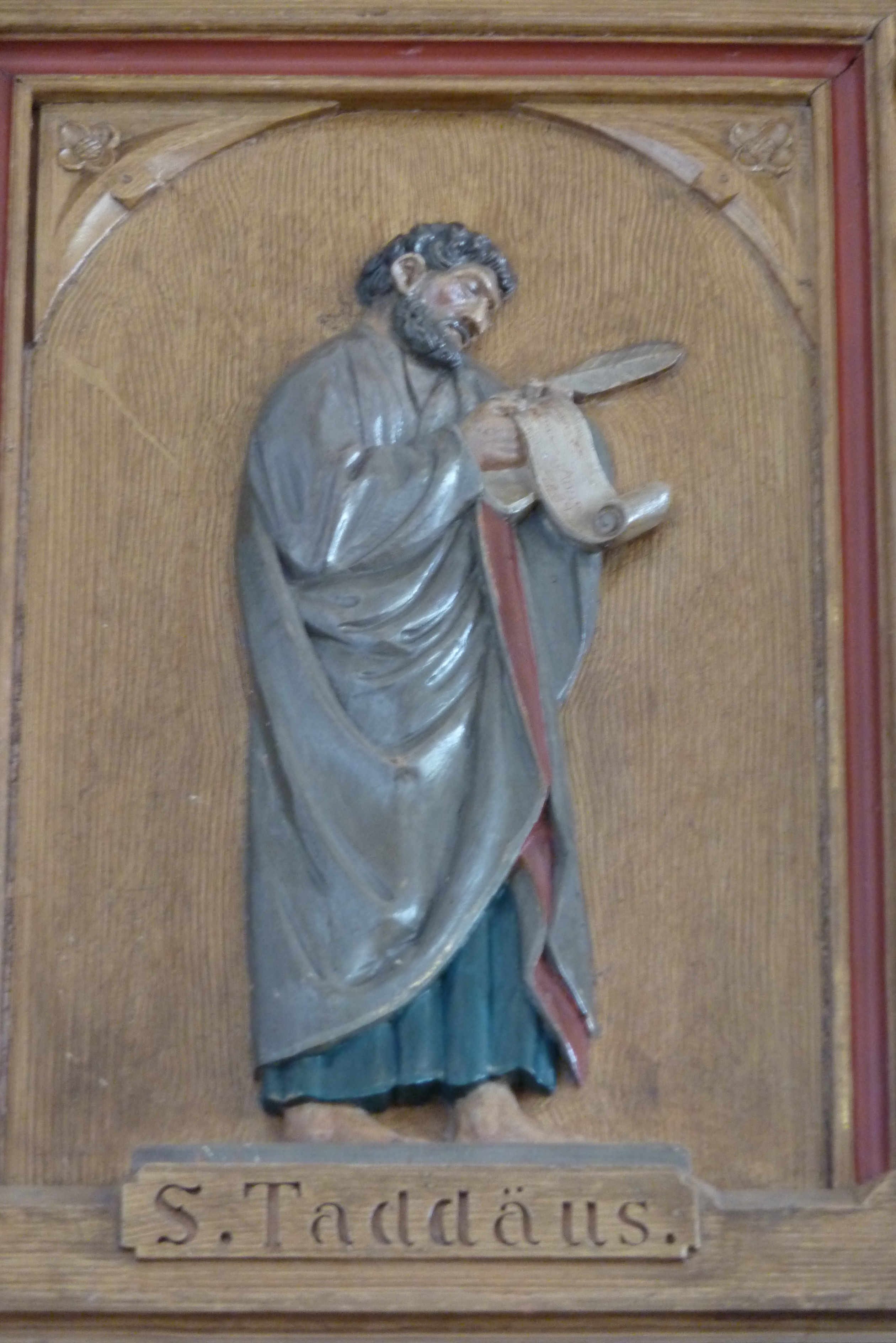 Relief des Apostels Thaddäus an der Empore der katholischen Pfarrkirche St. Walburga in Gelsdorf, Grafschaft